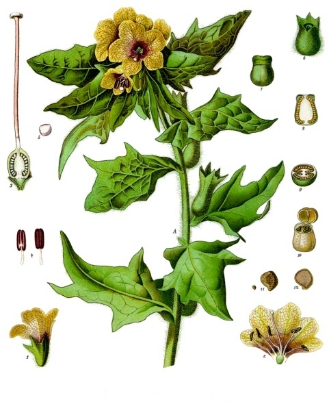 Schwarzes Bilsenkraut. A oberer Theil der Pflanze in natürl. Grösse; 1 Kelch mit Blumenkrone, desgl.; 2 aufgeschnittene und ausgebreitete Blumenkrone, desgl.; 3 Fruchtknoten mit Griffel und Narbe, vergrössert; 4 Staubgefässe, desgl.; 5 Pollenkorn, desgl.; 6 Frucht mit Fruchtkelch, desgl.; 7 Frucht mit geschlossenem Deckel, desgl.; 8 dieselbe im Längsschnitt, desgl.; 9 dieselbe im Querschnitt, desgl.; 10 dieselbe mit geöffnetem Deckel, desgl.; 11 Same, natürl. Grösse und vergrössert; 12 derselbe zerschnitten, vergrössert.